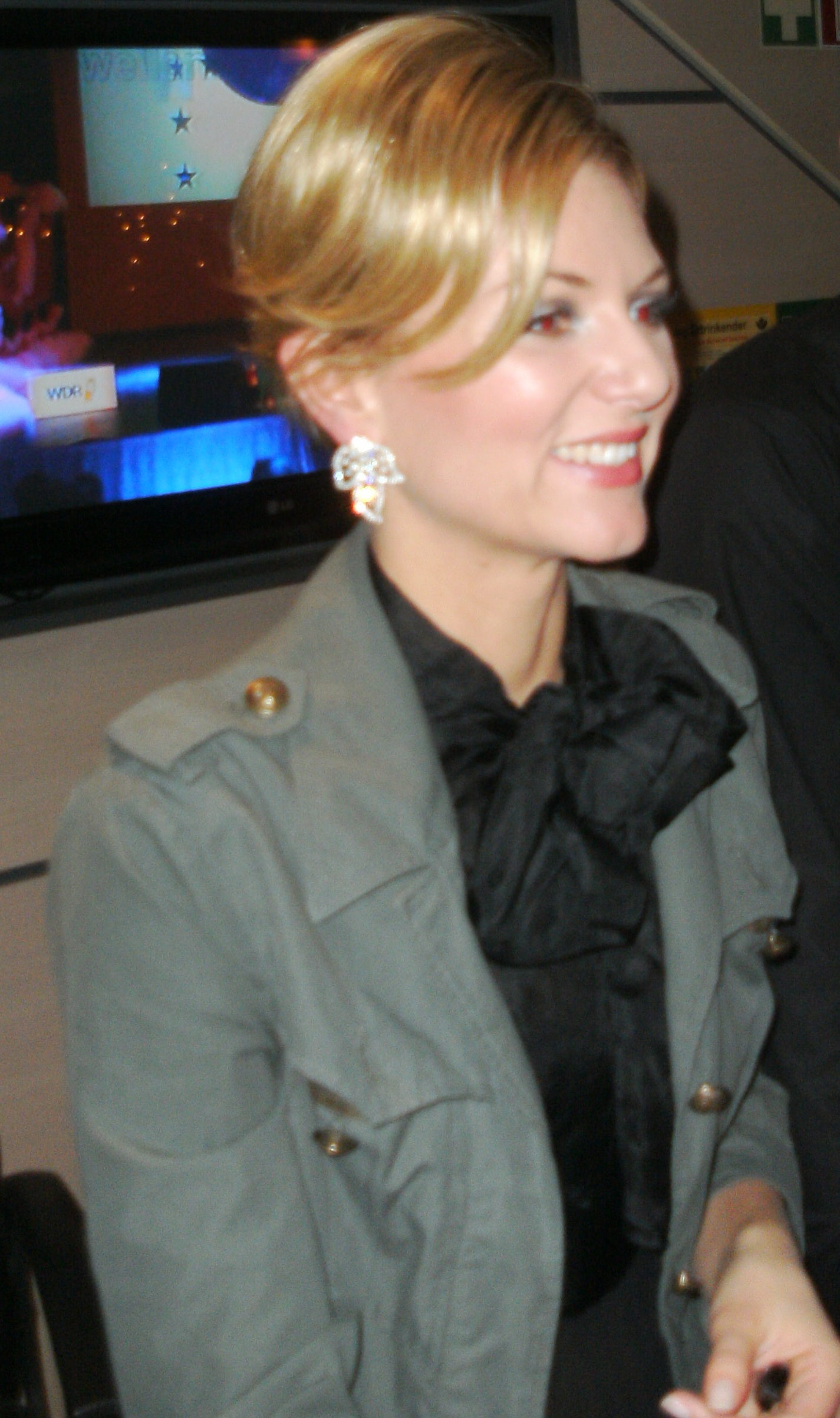 Ella Endlich bei einer Autogrammstunde anlässlich der WDR4 Wellentour 2013